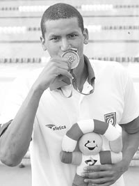 Photo of Oussama Mallouli given by him. Here the Email that I sent to him and his response : Salut Ous, Je suis administrateur de Wikipedia et nous recherchons des photos libres de droits de vous pour illustrer les articles vous concernant dans Wikipedia ( et Merci d'avance Cordialement, Kaïs Turki -- Bonjour Kais, Merci pour s'etre interesse a moi. Voila quelques photos que vous pouvez mettre sur votre site. Ous Mellouli